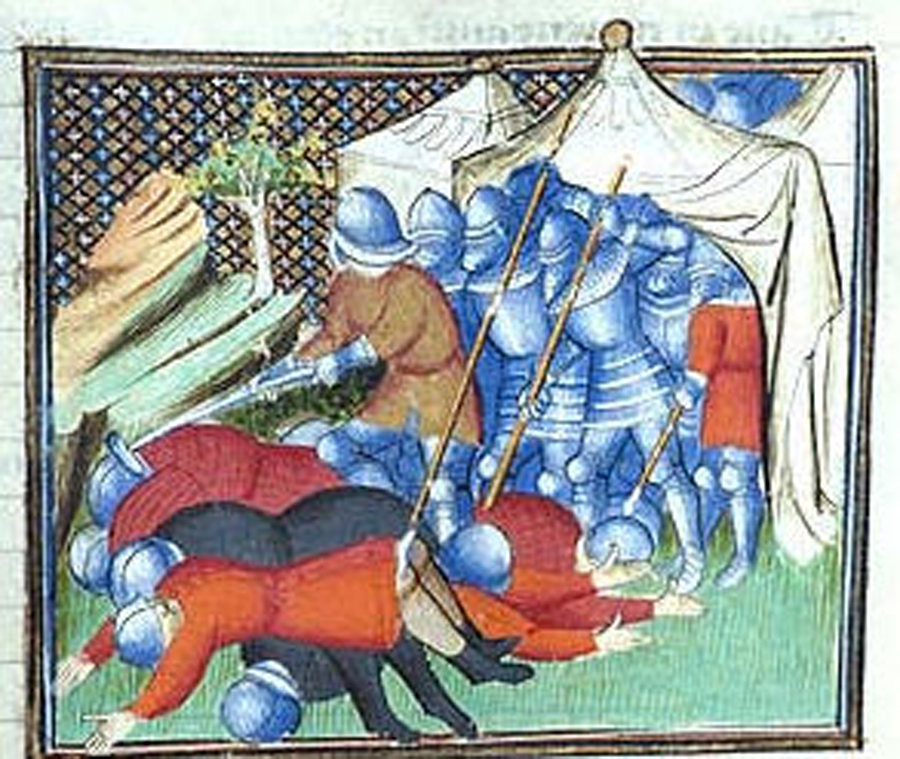 Jacquerie